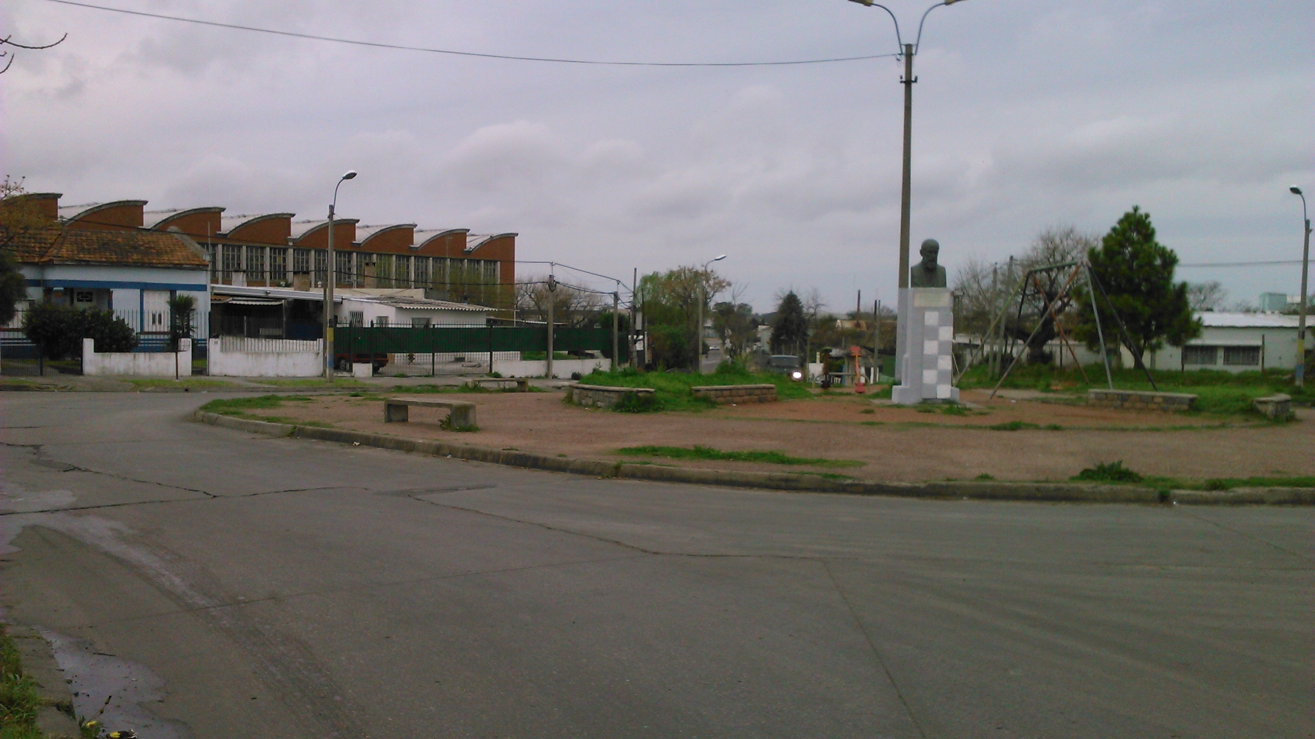 Esta plaza aún se encuentra en Maroñas. Pero podemos visualizar a lo lejos el Centro de Distribución de la cadena de Supermercados Ta-ta que está por Veracierto.